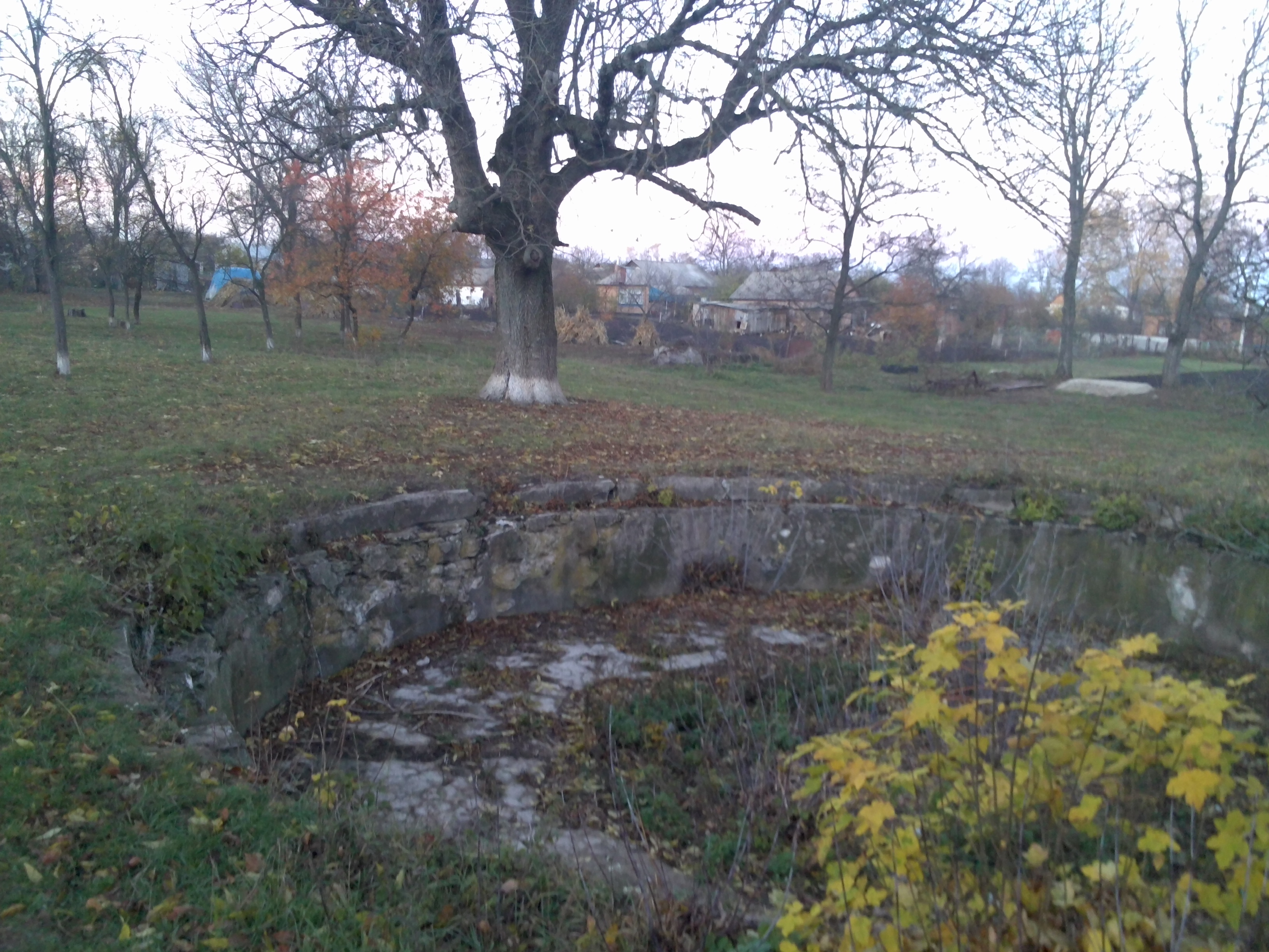 с. Нападівка. Басейн у парку поблизу палацу Тора Ланге